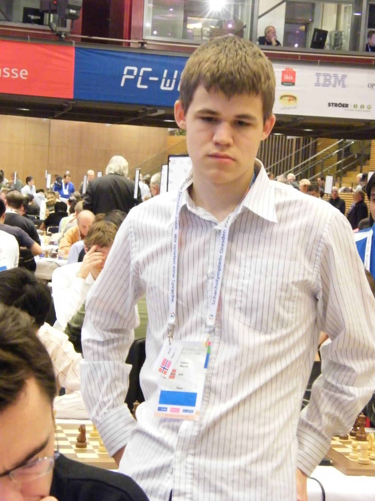 Magnus Carlsen bei der 38. Schacholympiade in Dresden 2008, kiebitzend bei Loek van Wely.